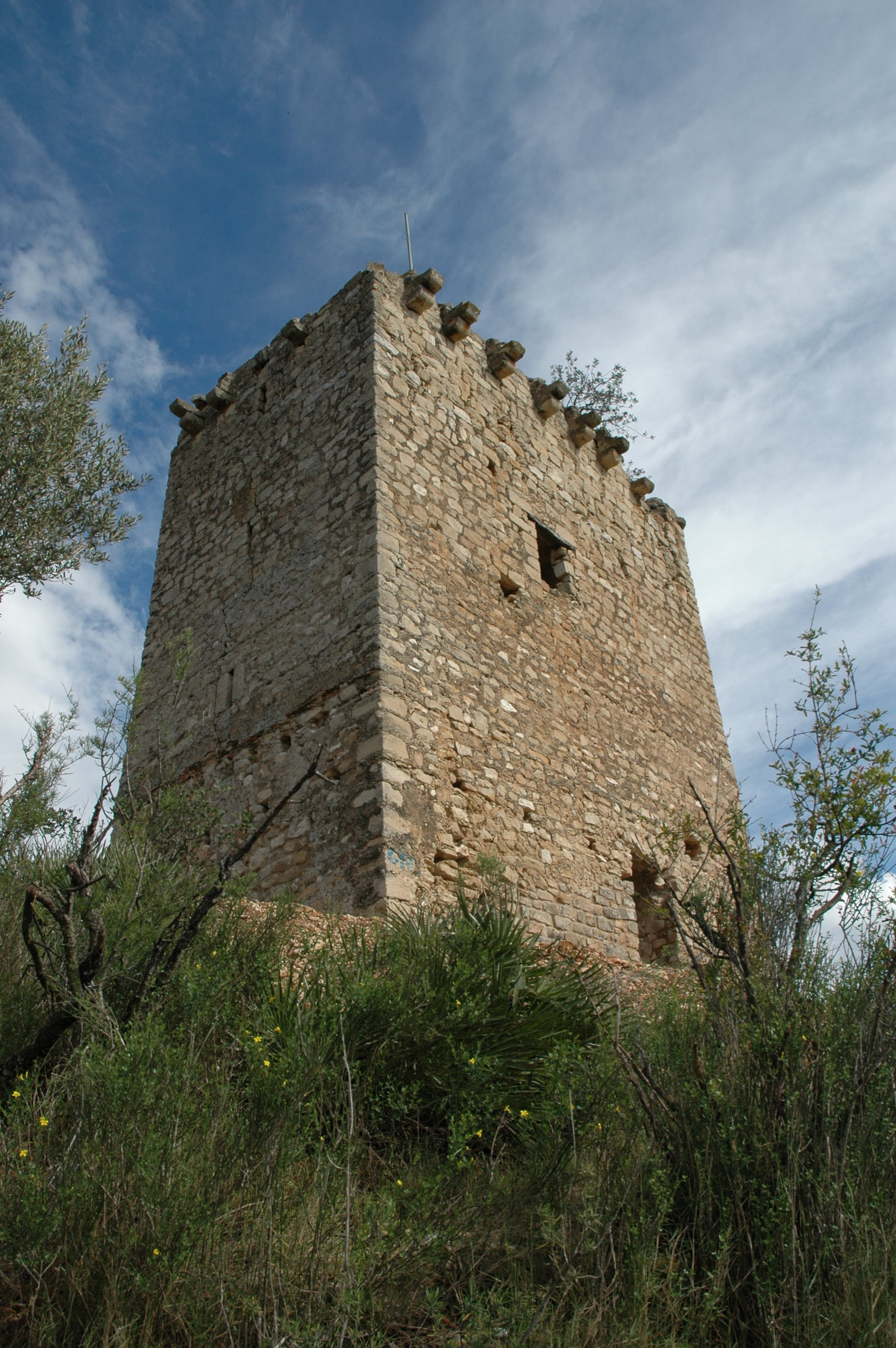 Campredó (Baix Ebre). La torre de Font de Quinto, s. XIII, abans d'ésser restaurada.